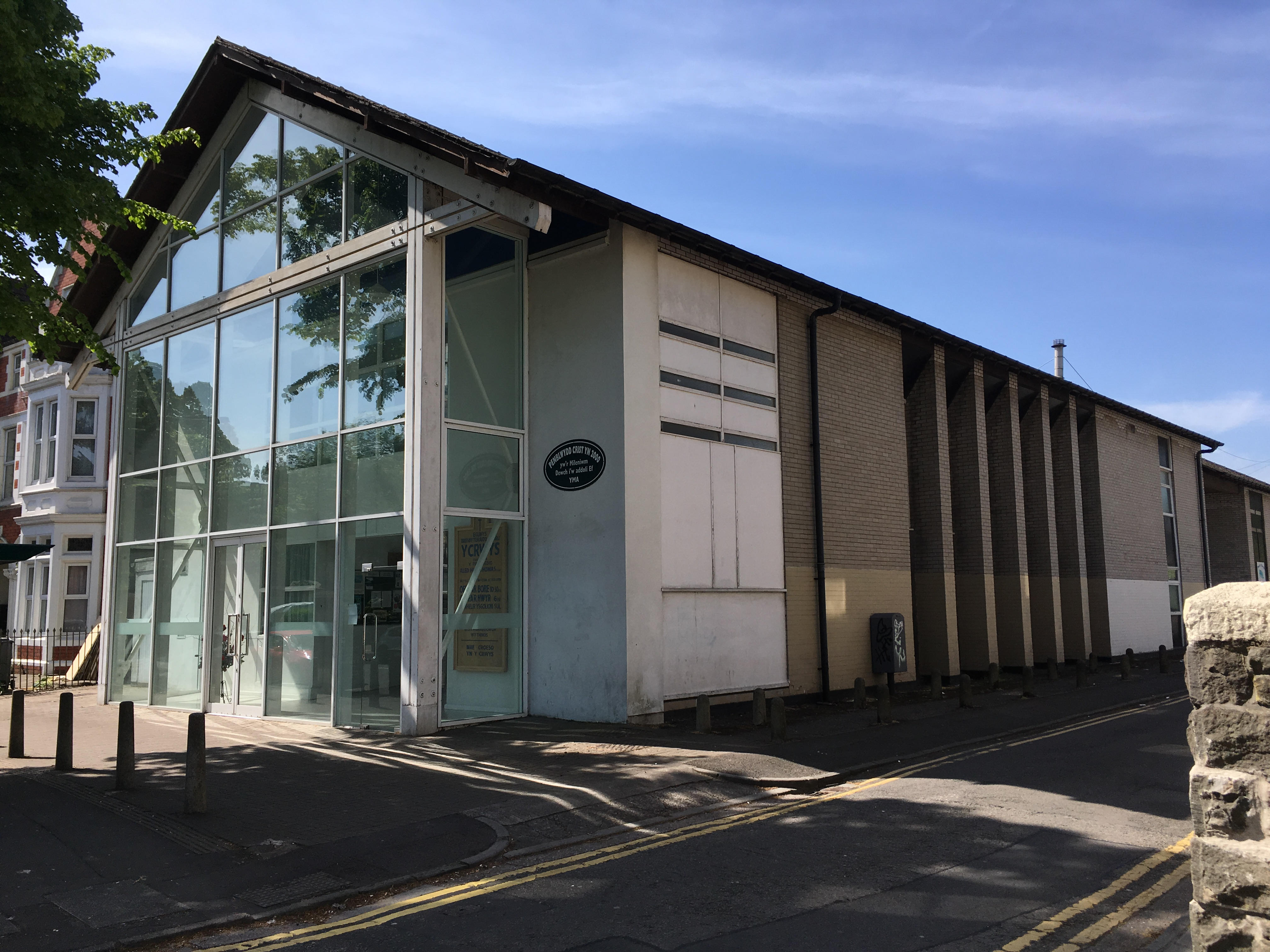 Eglwys y Crwys